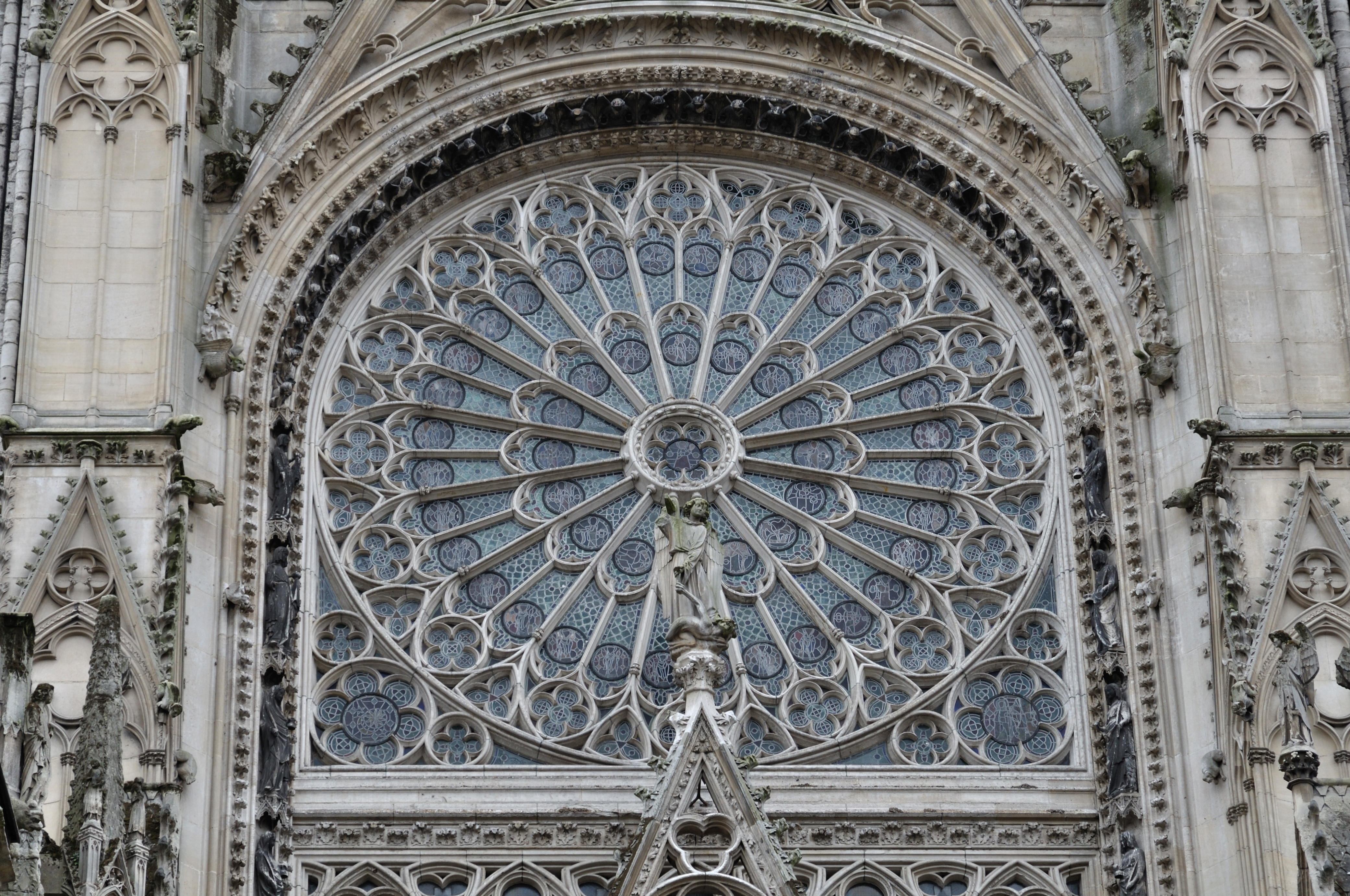 Ensemble archiépiscopal(Cathédrale Notre-Dame, maison de l'Œuvre, vestiges archéologiques) (Classé), rose du transept nord dite rose des Libraires.